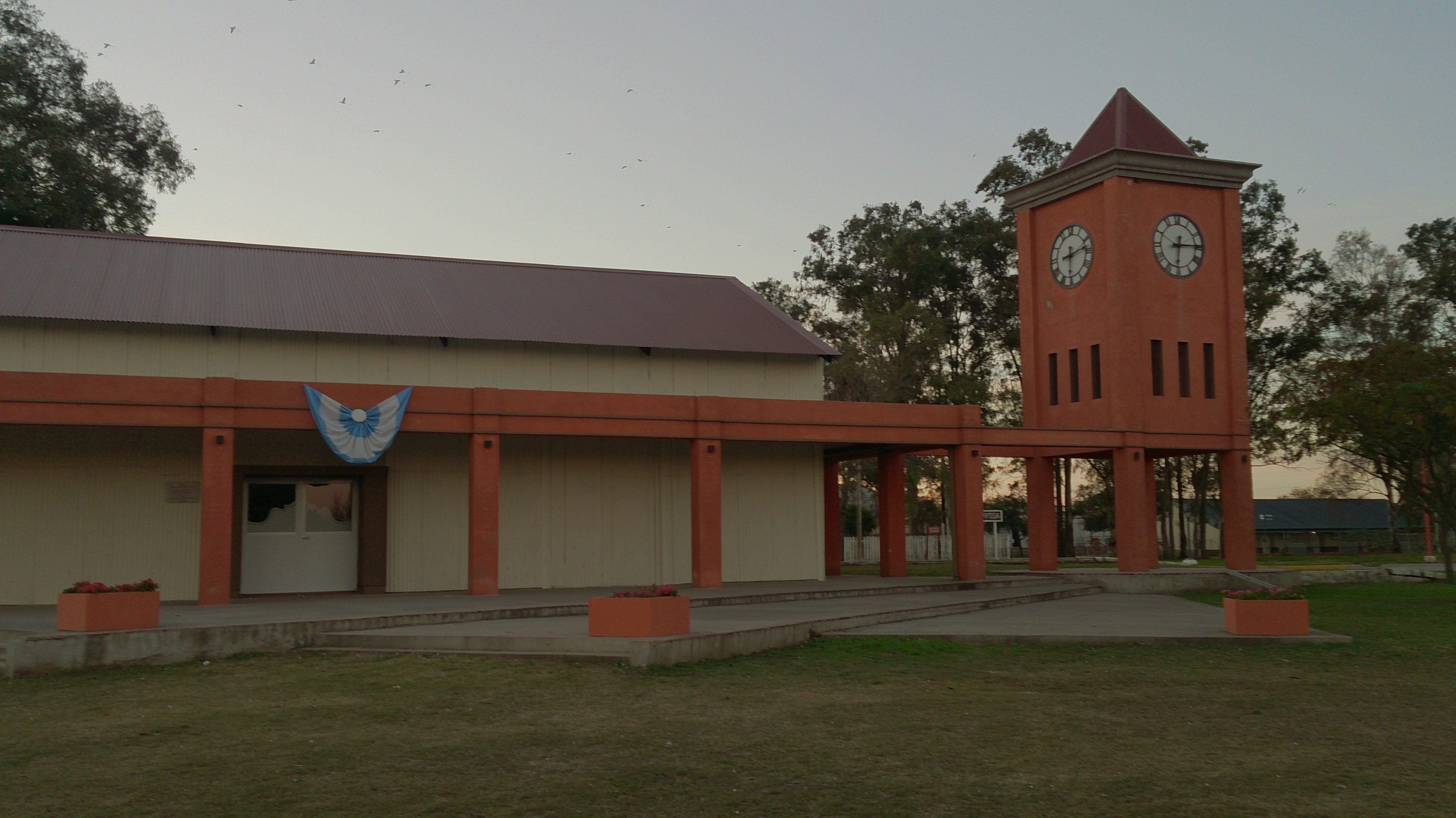 Restauración de la antigua estación de trenes, hoy SUM y Biblioteca Municipal.